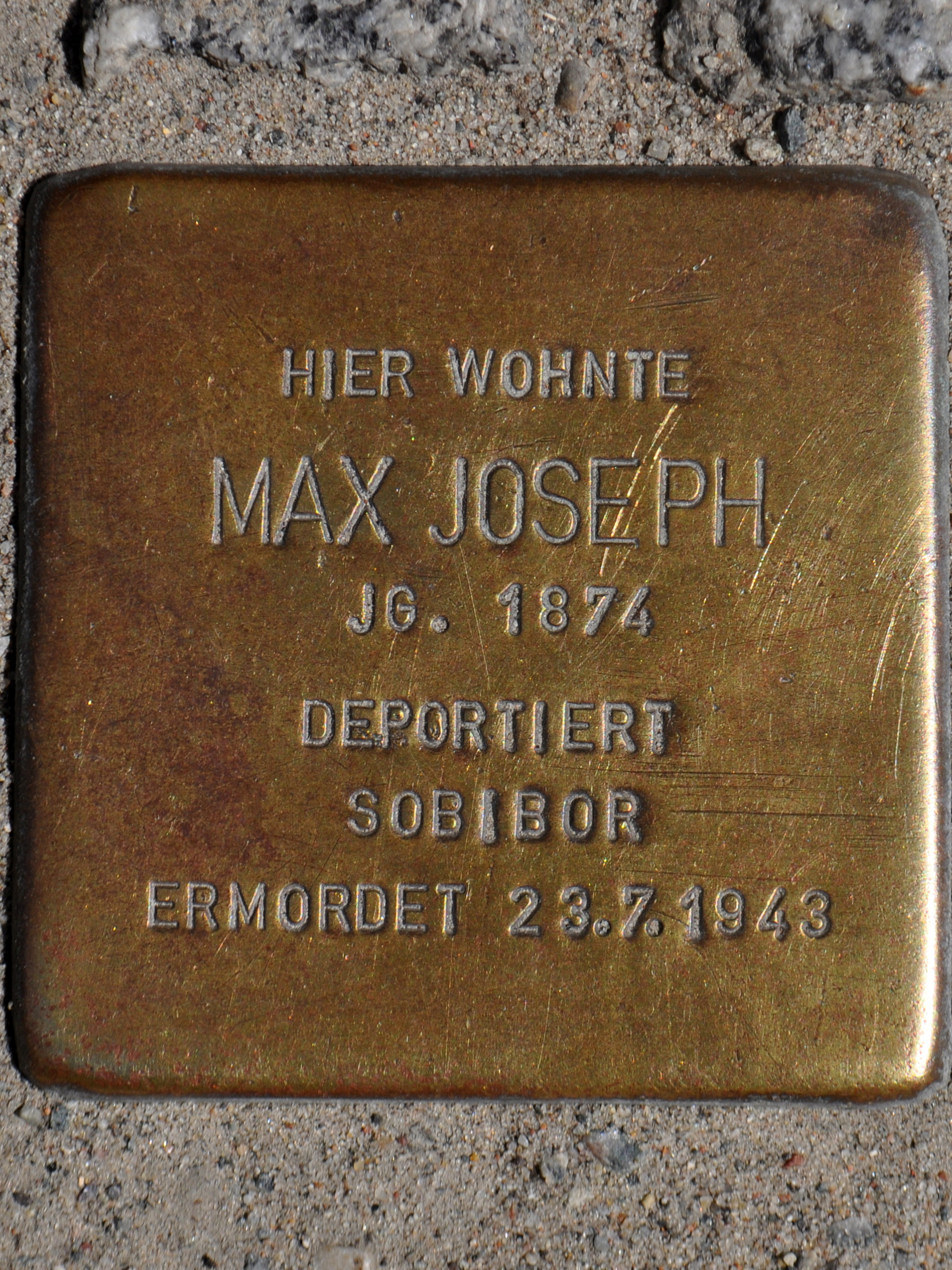 Stolperstein in Stralsund, Ossenreyerstraße MAX JOSEPH JG. 1874 DEPORTIERT SOBIBOR ERMORDET 23.7.1943